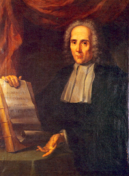 Giuseppe Averani, Italian jurist and naturalist, 1662-1738